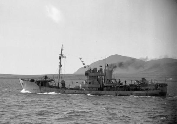 Der in Deutschland gebaute britische U-Abwehr-Trawler NORTHERN GEM